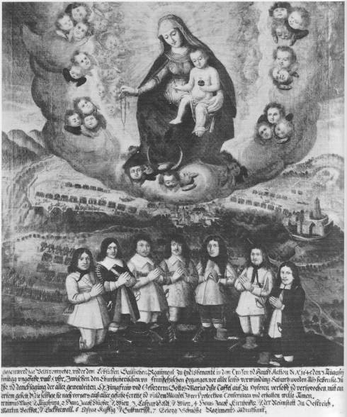 Votivbild bayrischer Soldaten zum Dank fÃ¼r ihre Rettung aus der Schlacht bei Alerheim (1645). 326 Bildern und Dokumenten, Aschendorff-Verlag, MÃ¼nster